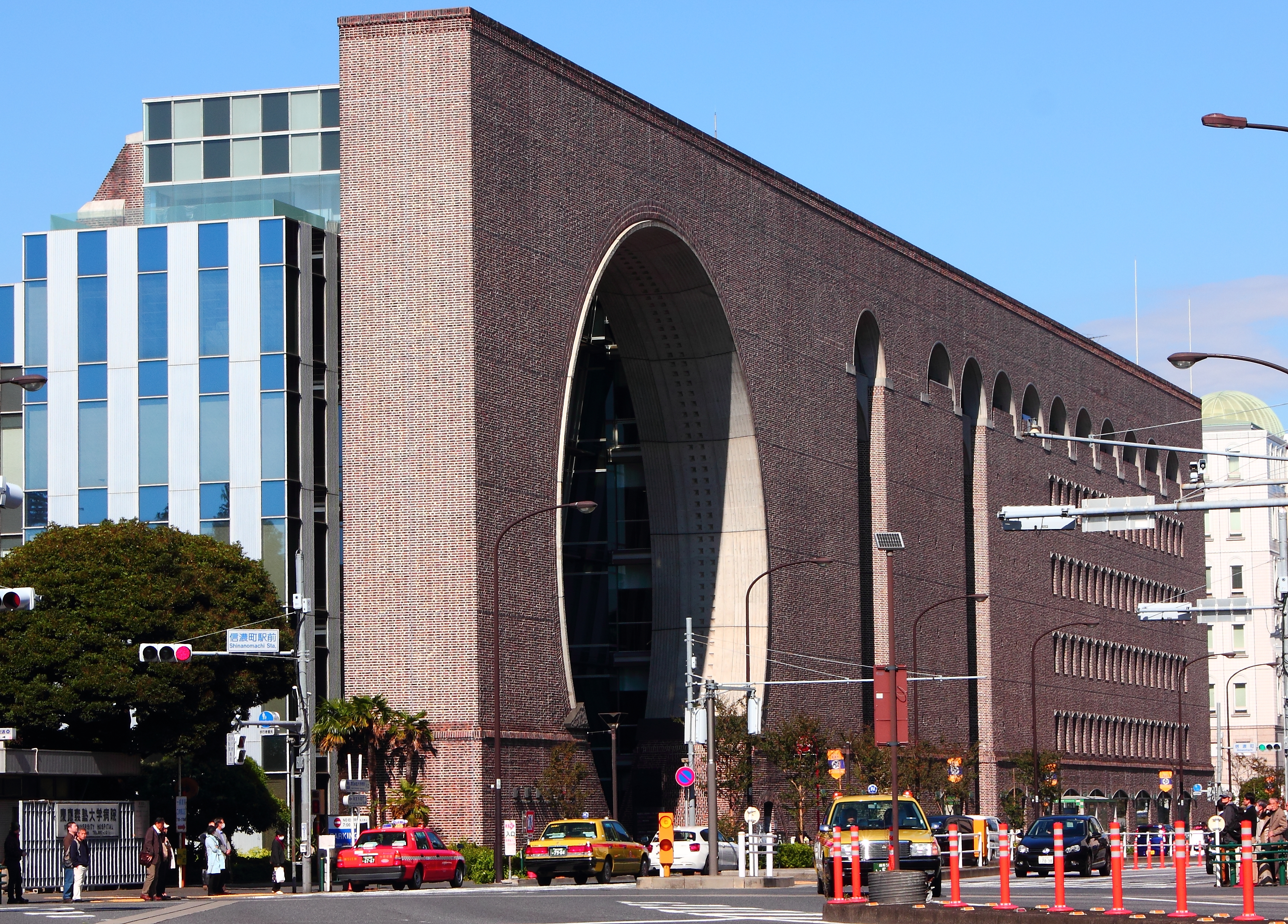 慶応大学信濃町キャンパスの敷地に建つ煉瓦館（東京都新宿区）